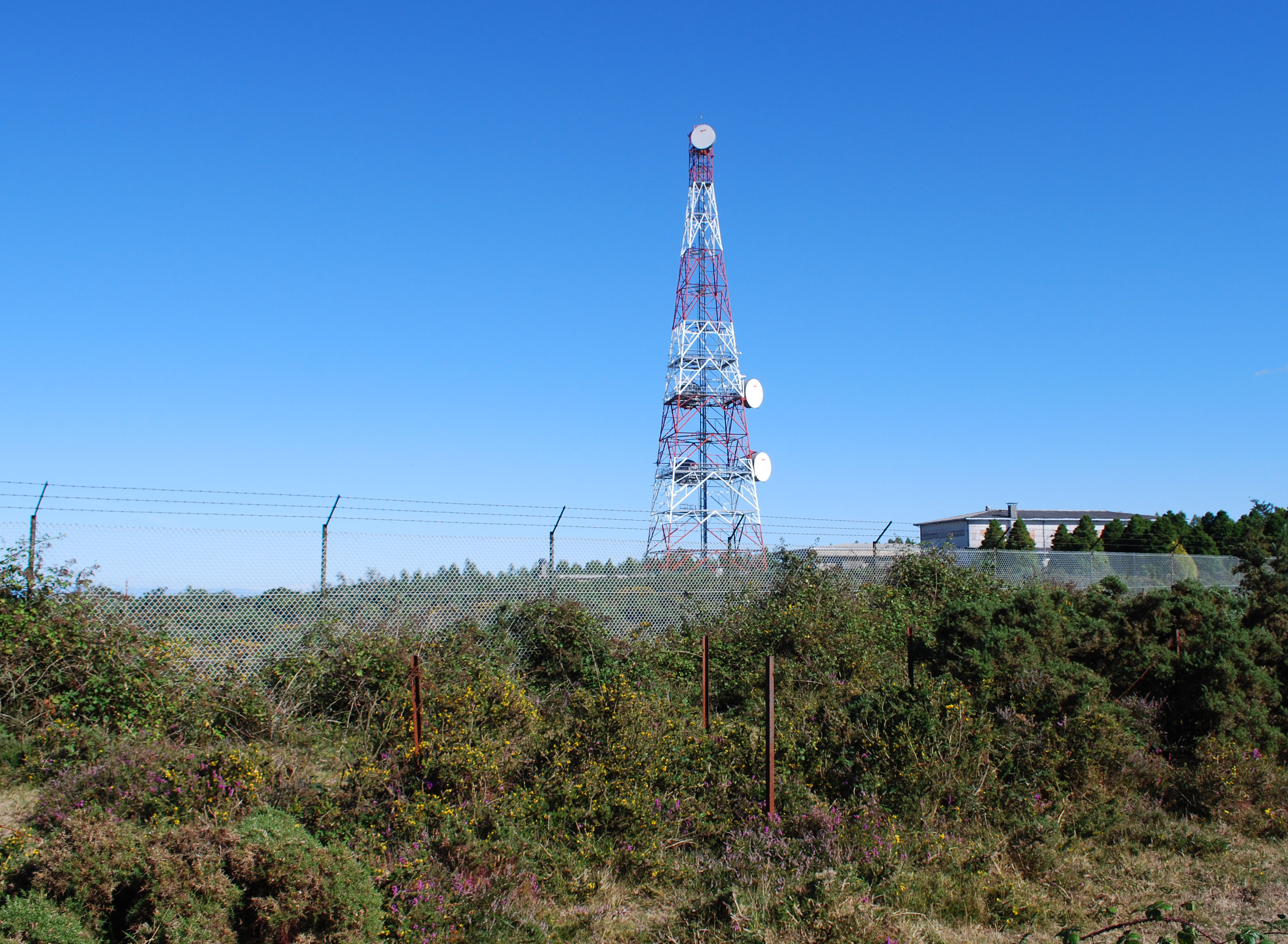 Base Militar da Armada Española en Campelo concello de Friol Lugo Galiza Spain